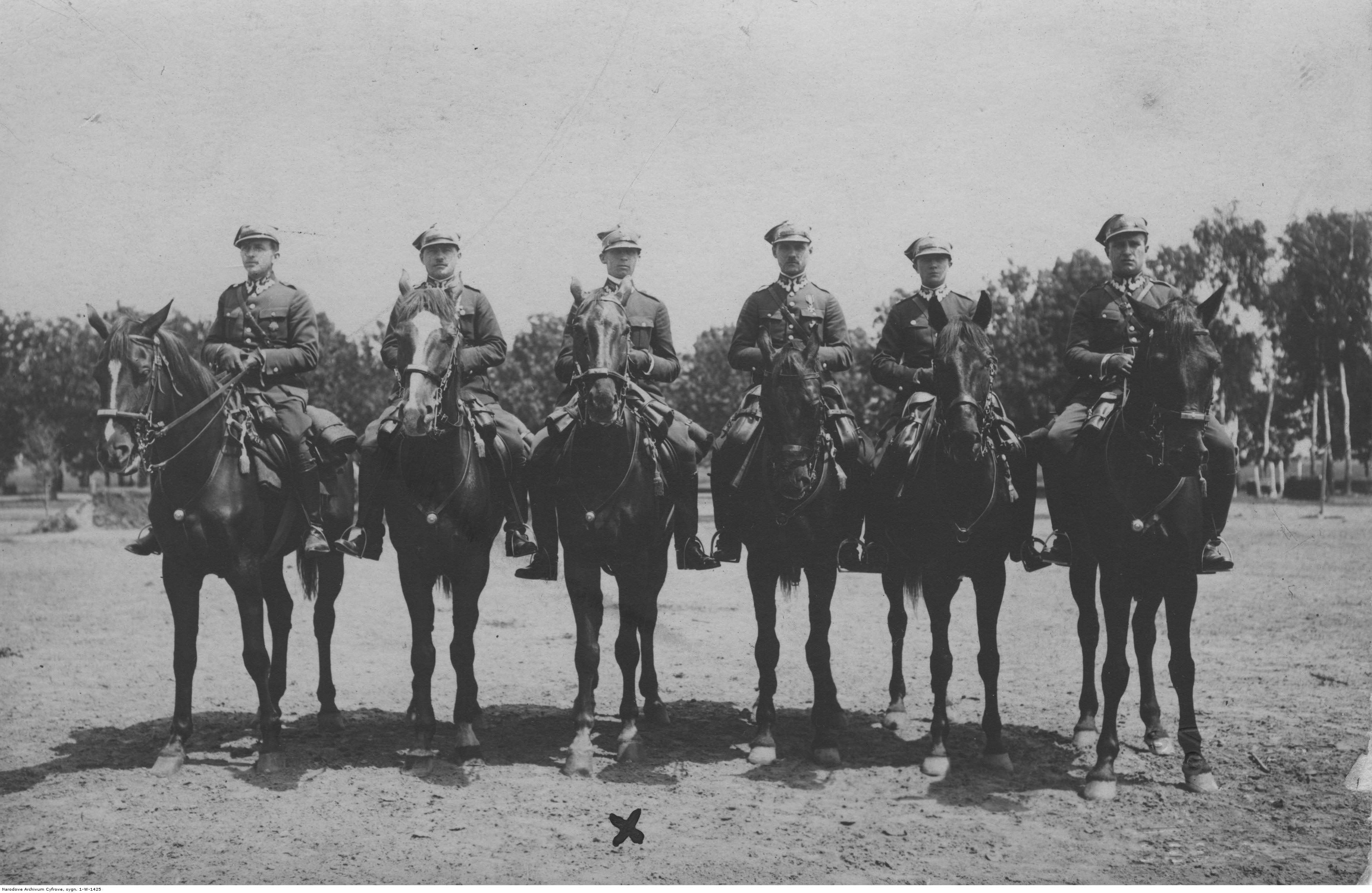 Oficerowie rezerwy 20 Pułku Ułanów. Fotografia grupowa. Od lewej: ppor. Strzelecki, ppor. Smolarek, por. Szeliski, ppor. Gintner, ppor. Stafiek, ppor. Dramiński (nazwiska odczytane z pisowni odręcznej autora fotografii). Koncern Ilustrowany Kurier Codzienny - Archiwum Ilustracji. Sygnatura: 1-W-1425